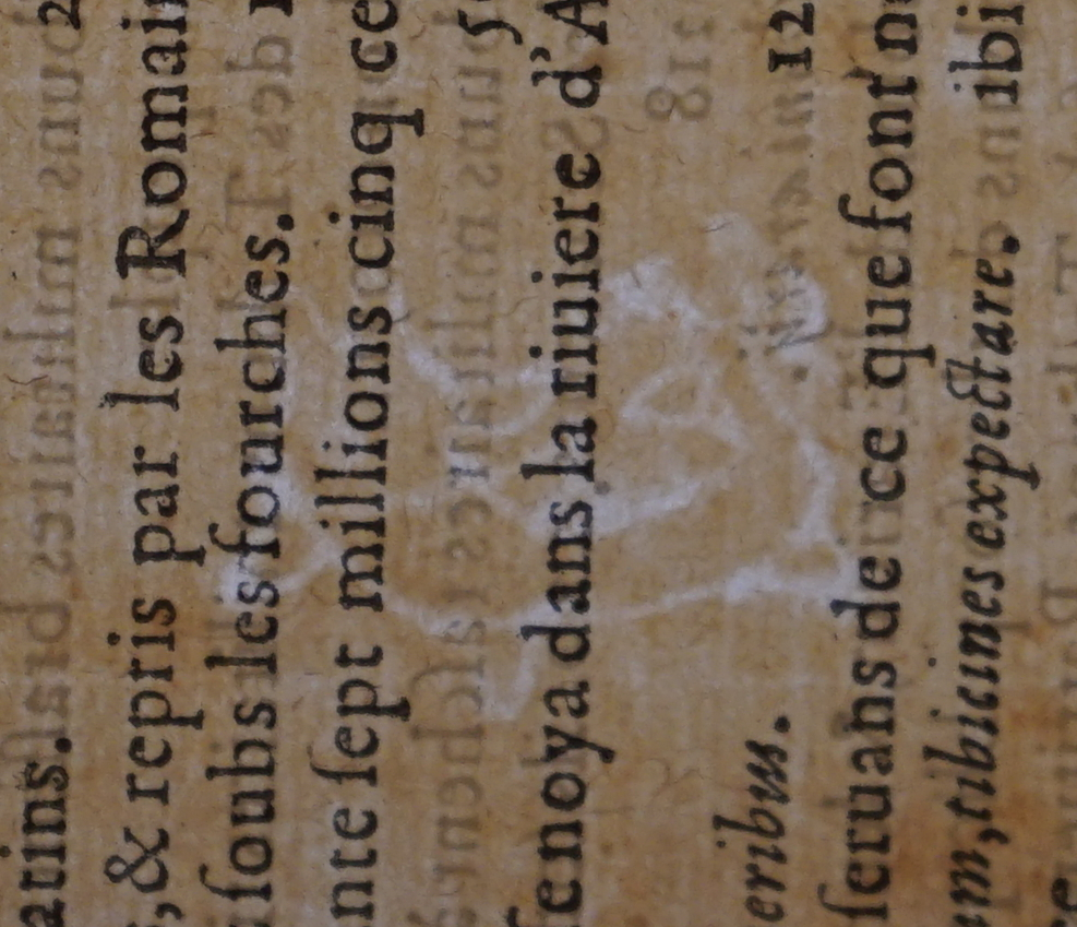 extrait du livre "les décades .. deTite Live...".